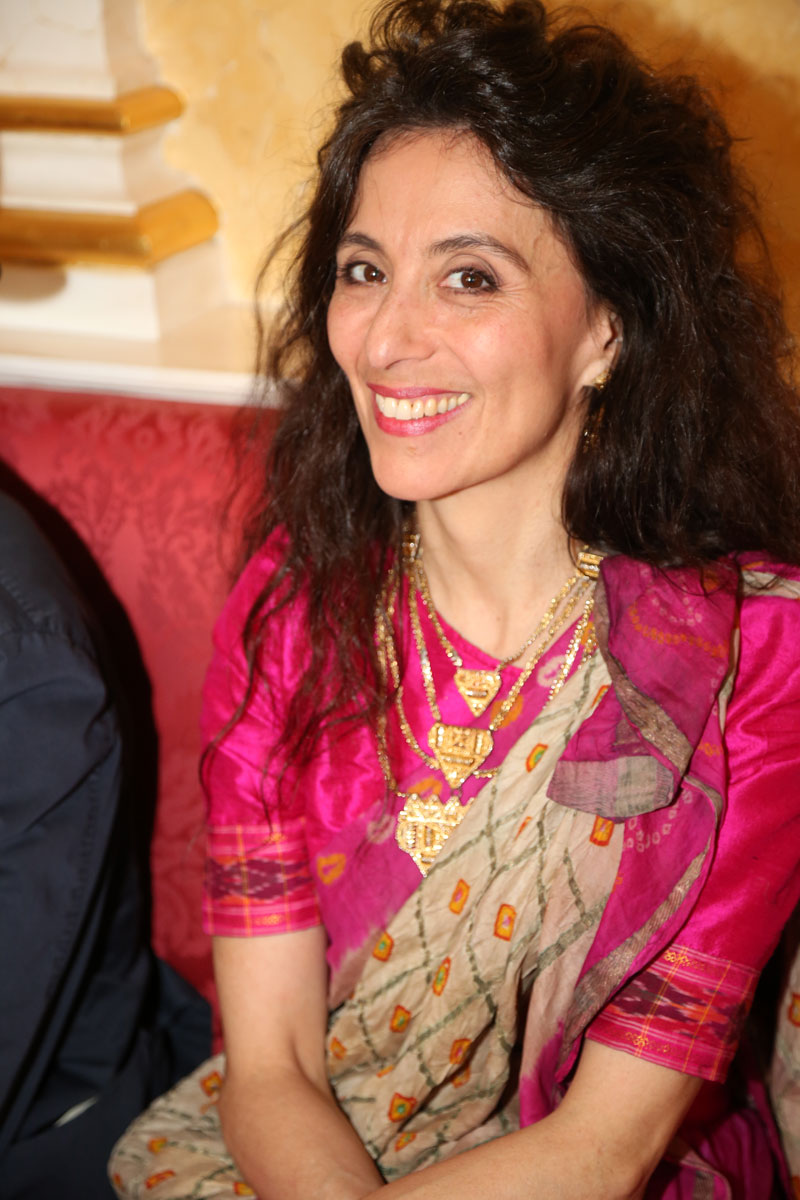 Timna Brauer-8326